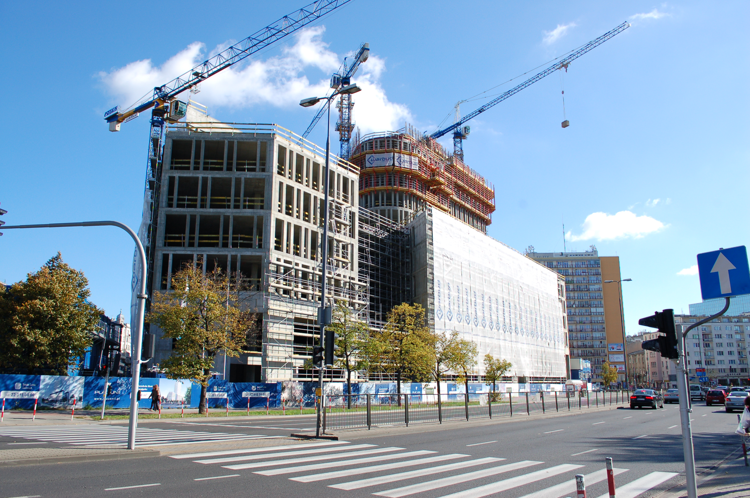 Warsaw, Plac Unii